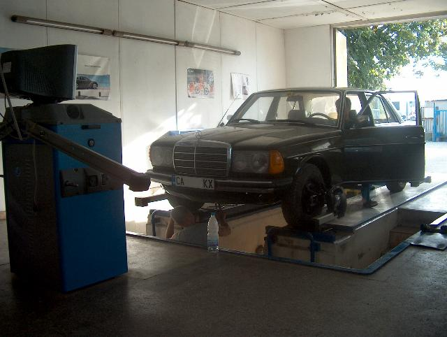 Achsvermessung und Einstellung in einer Spezialwerkstatt